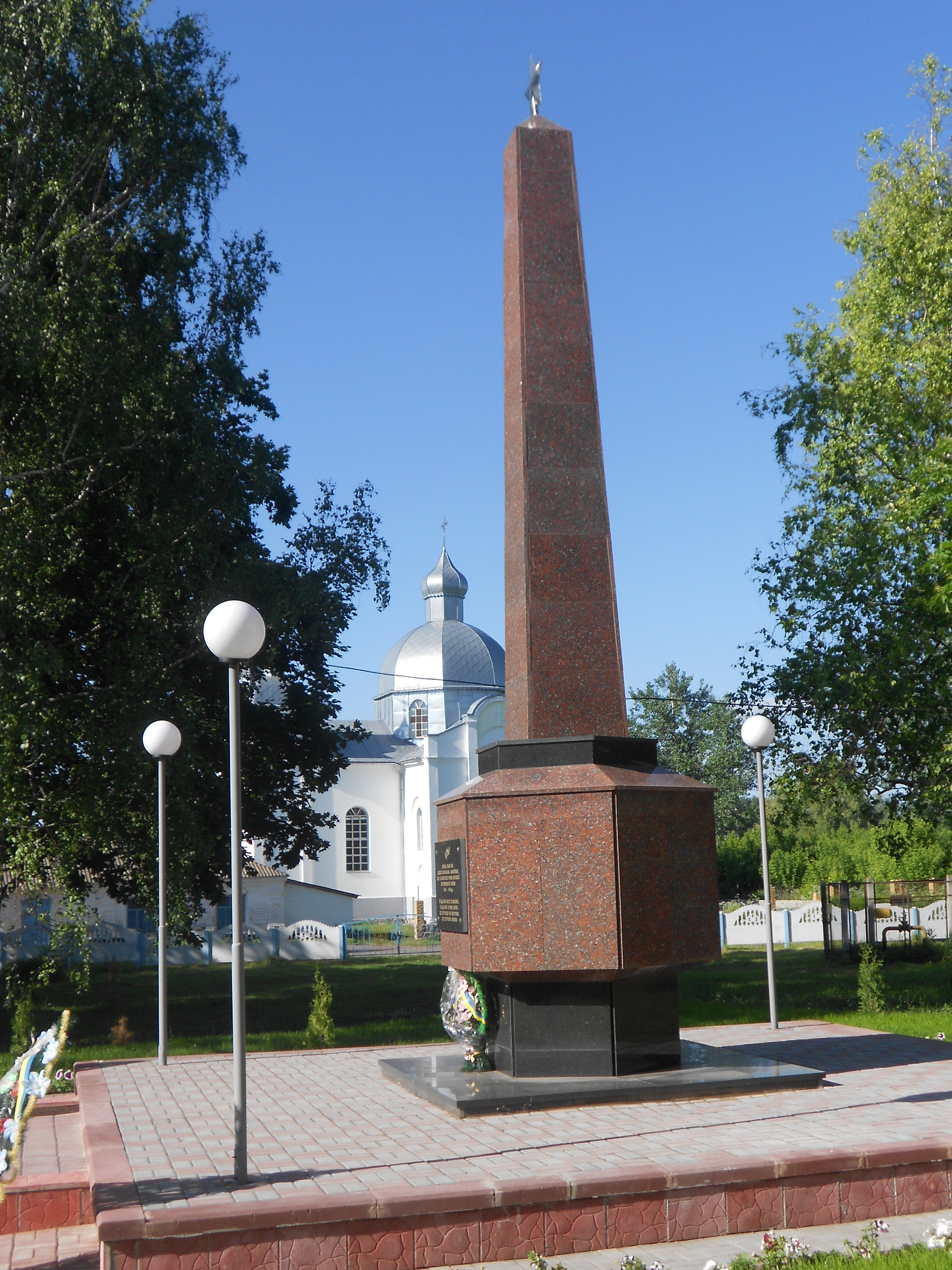 Пам'ятник у Макіївці